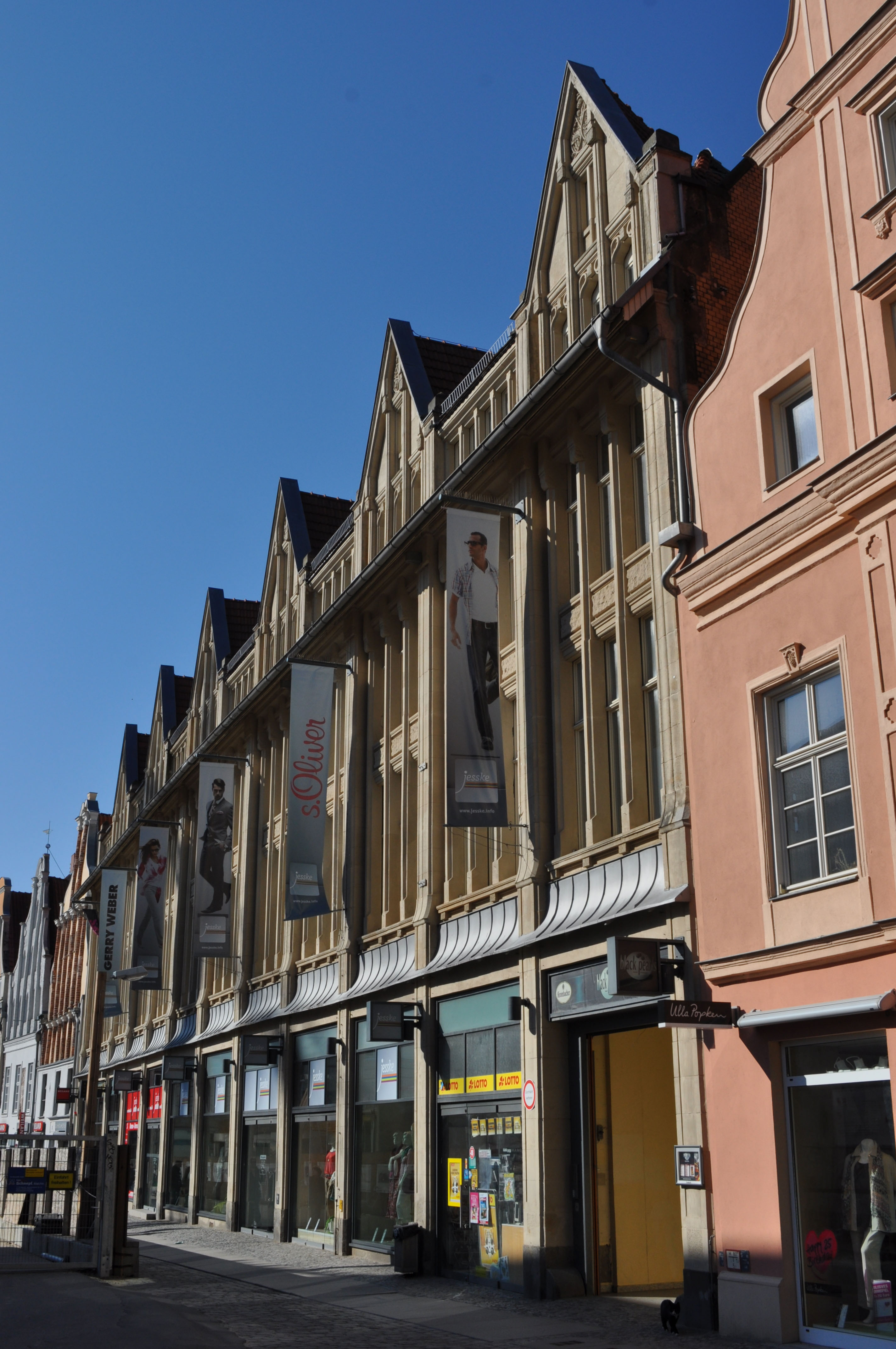 Gebäude bzw. Gebäudedetail in Stralsund. Straße und Hausnummer siehe Dateiname.